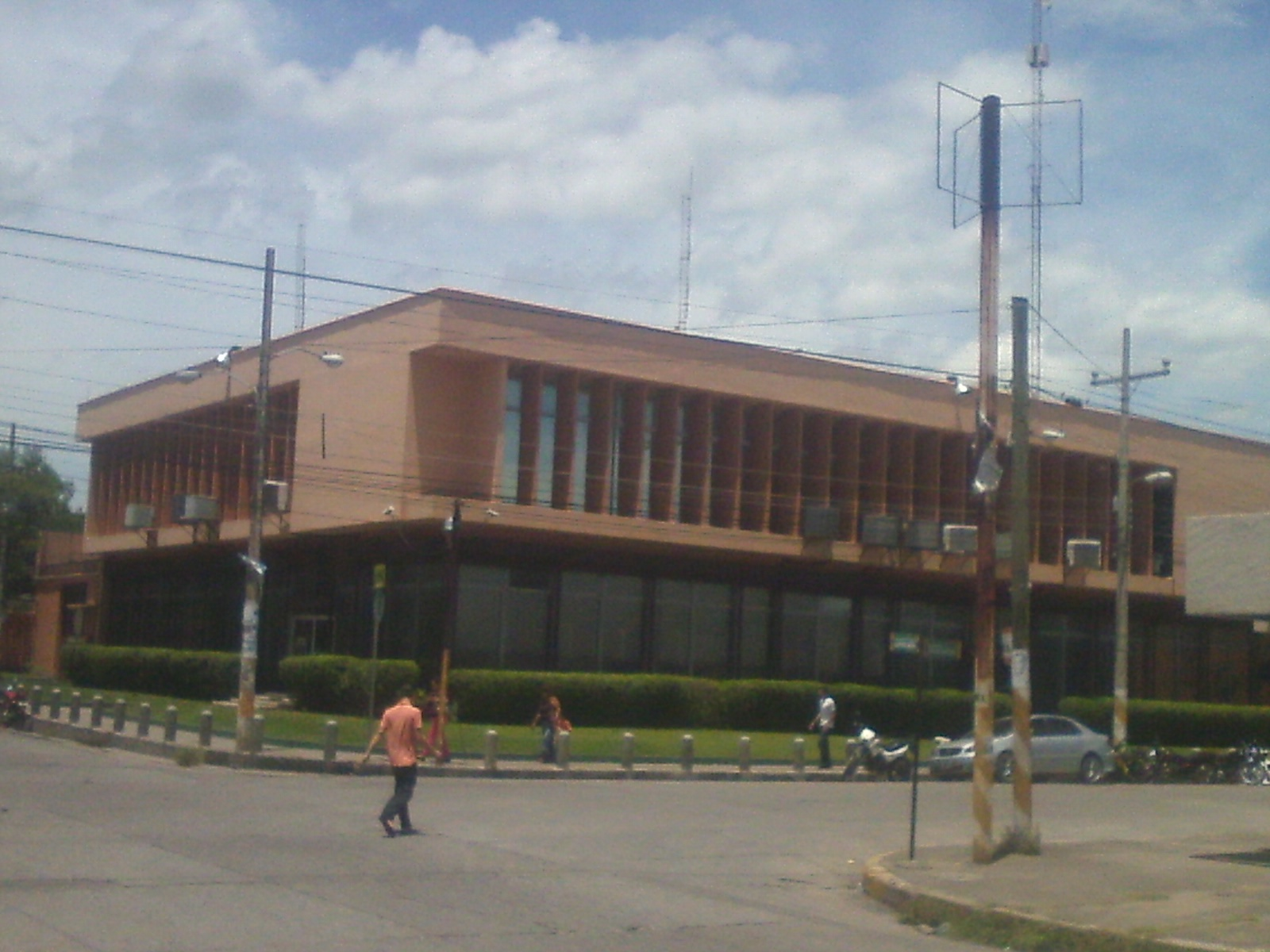 Banco Central de Honduras oficina en Choluteca